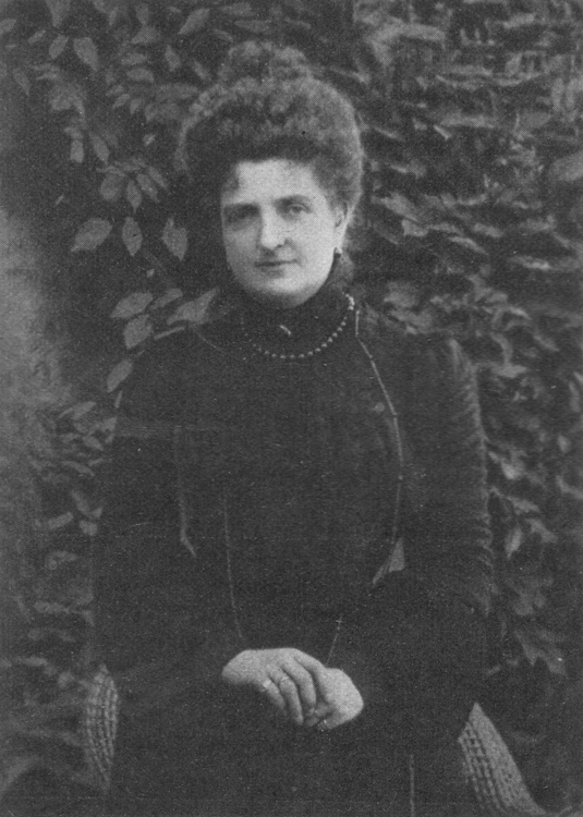 Margherita di Savoia (1851-1926)